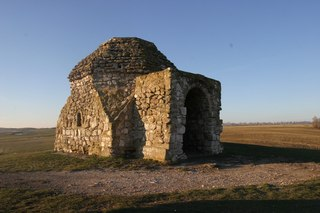 Мавзолей Тура-хана—сооружение Тура-хана, построенное в XIV—XV веках, являлось «Домом суда», где проходили судебные процессы.